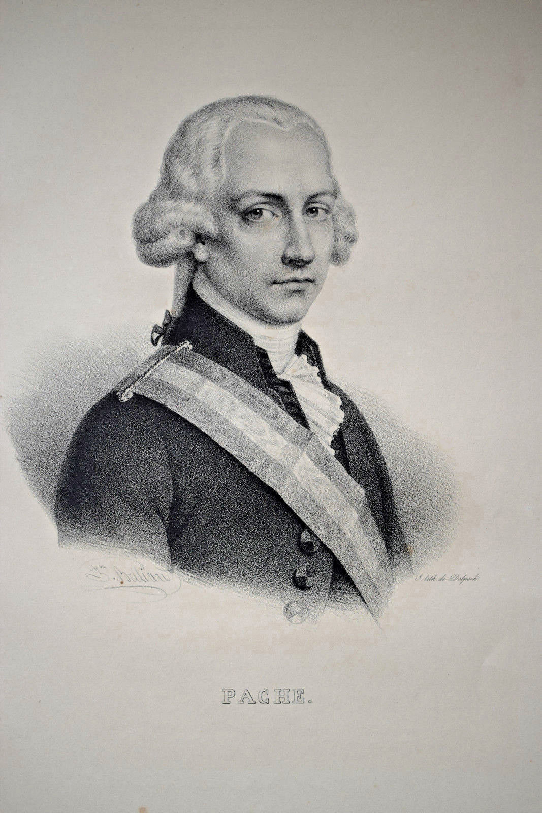 Jean-Nicolas Pache. Lithographie de François-Séraphin Delpech d'après un portrait par Zéphirin Belliard, 1832.